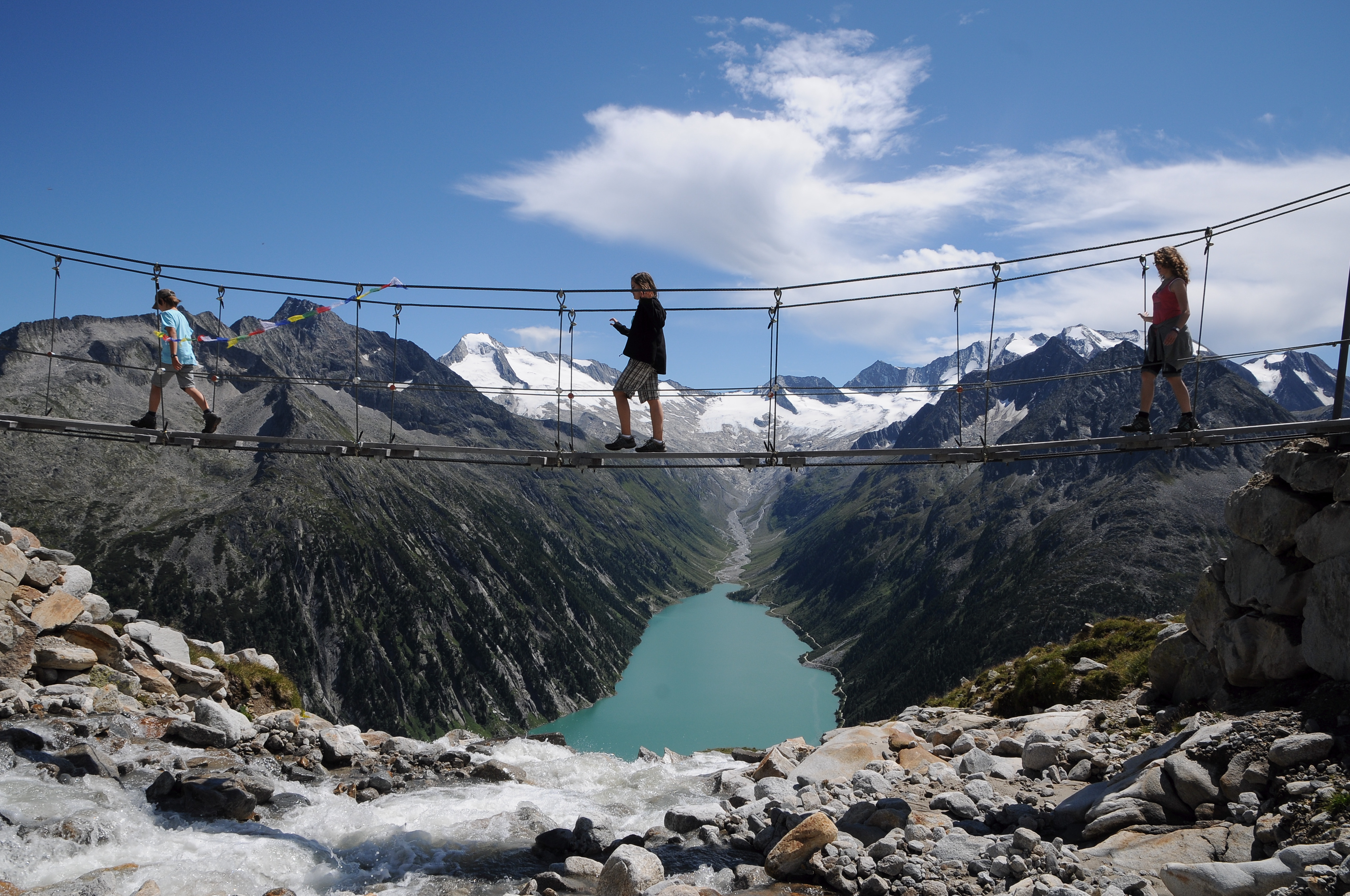 Drahtsteg Hängebrücke am Berliner Höhenweg Nr.526 in den Zillertaler Alpen auf einer Höhe von 2413 Metern. Ihn erreicht man zu Fuß in 5 Minuten von der Olpererhütte. Im Tal liegt der Schlegeisspeicher.